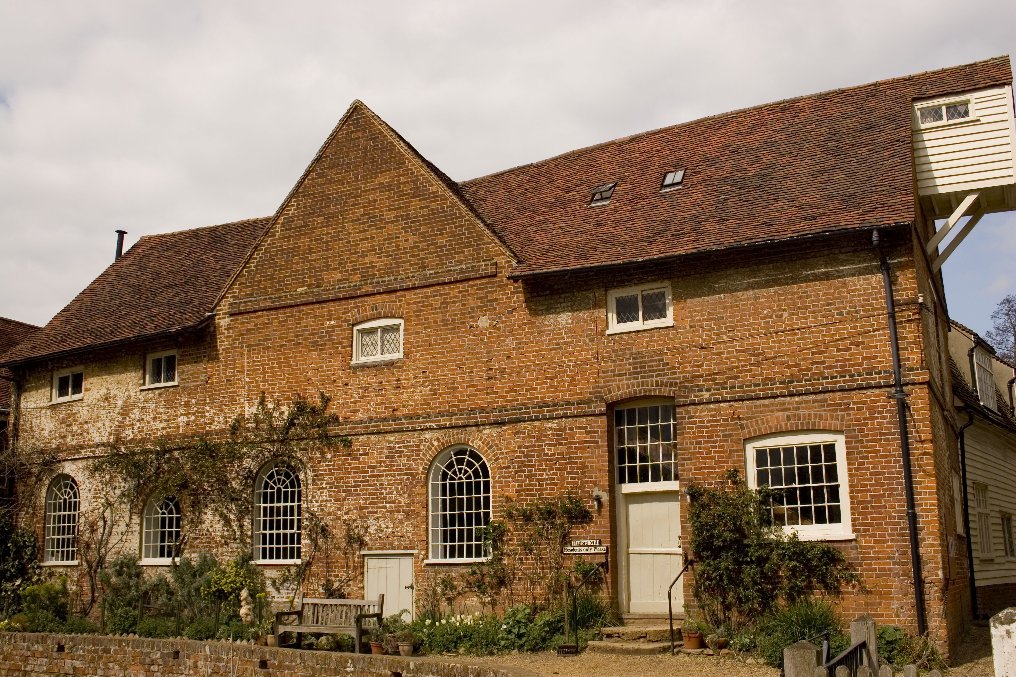 Flatford Mill, Flatford